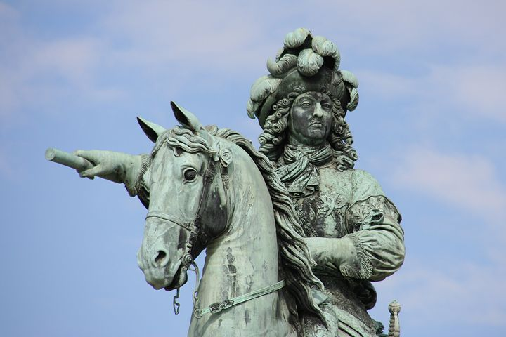 Statue équestre de Louis XIV, qui était installée dans la cour d'honneur du Château de Versailles. En 2005 la statue a été déplacée lors des travaux destinés à rétablir la grille séparant la cour d'honneur de la place d'armes. Elle a pris place depuis dans l'Orangerie. Photo : PY.Stucki